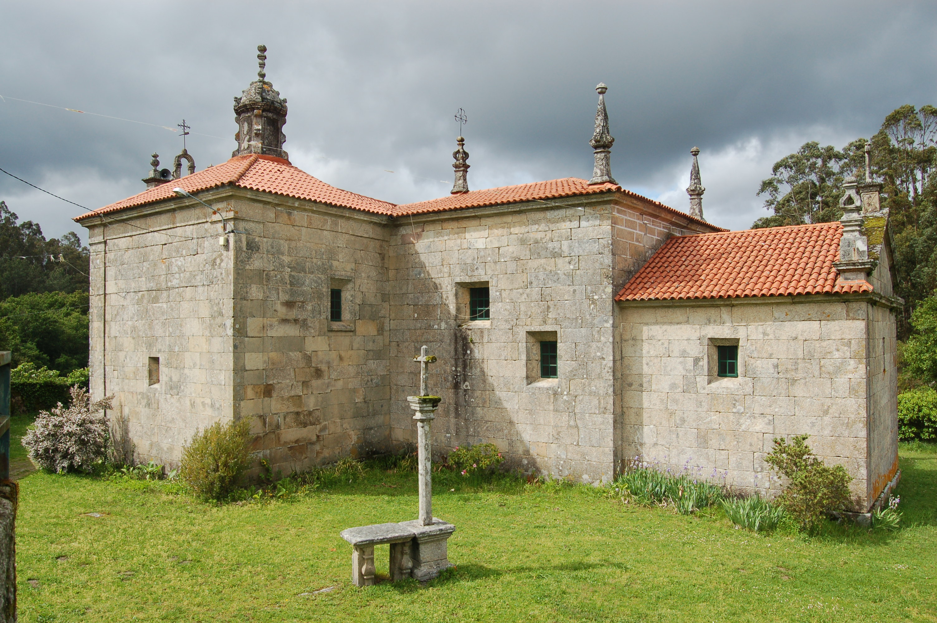 Igrexa parroquial de Santa Mariña de Bora (Pontevedra)